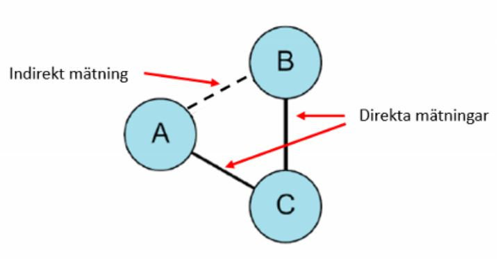 Exempel på nätverk vid nätverksmetaanalys